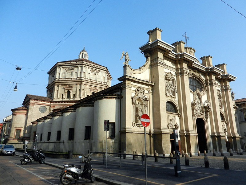 Milano - Chiesa di S. Maria della Passione